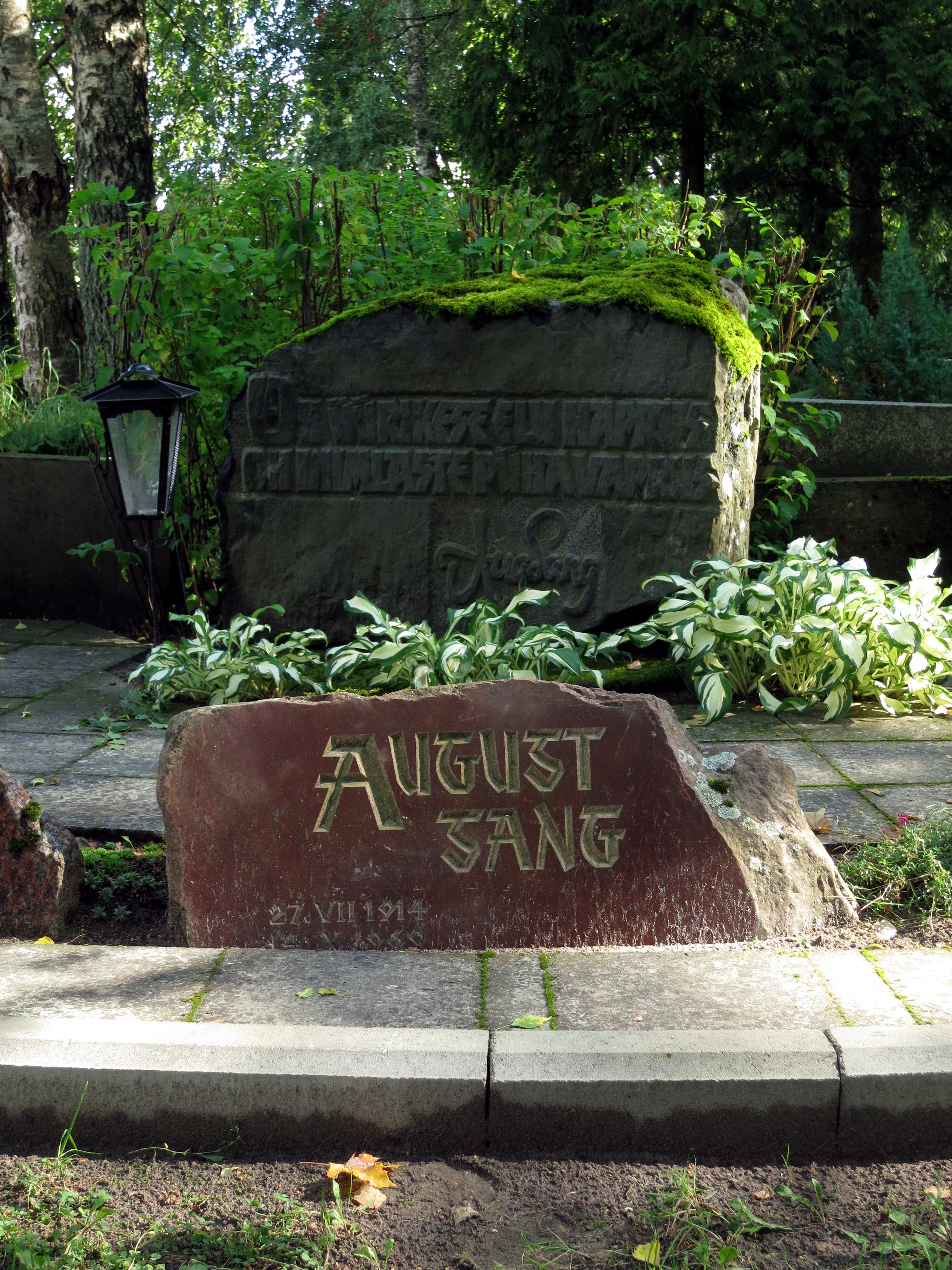 August Sanga haud